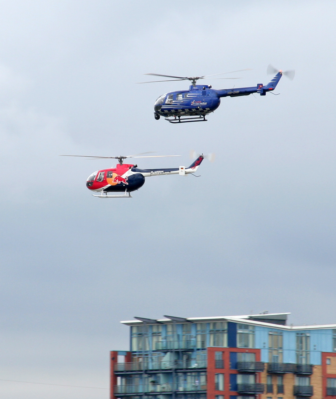 Red Bull Air Race Messerschmitt-Bolkow-Blohm MBB B�.105S HB-ZHS and MBB B�.105C D-HTDM. London 2008